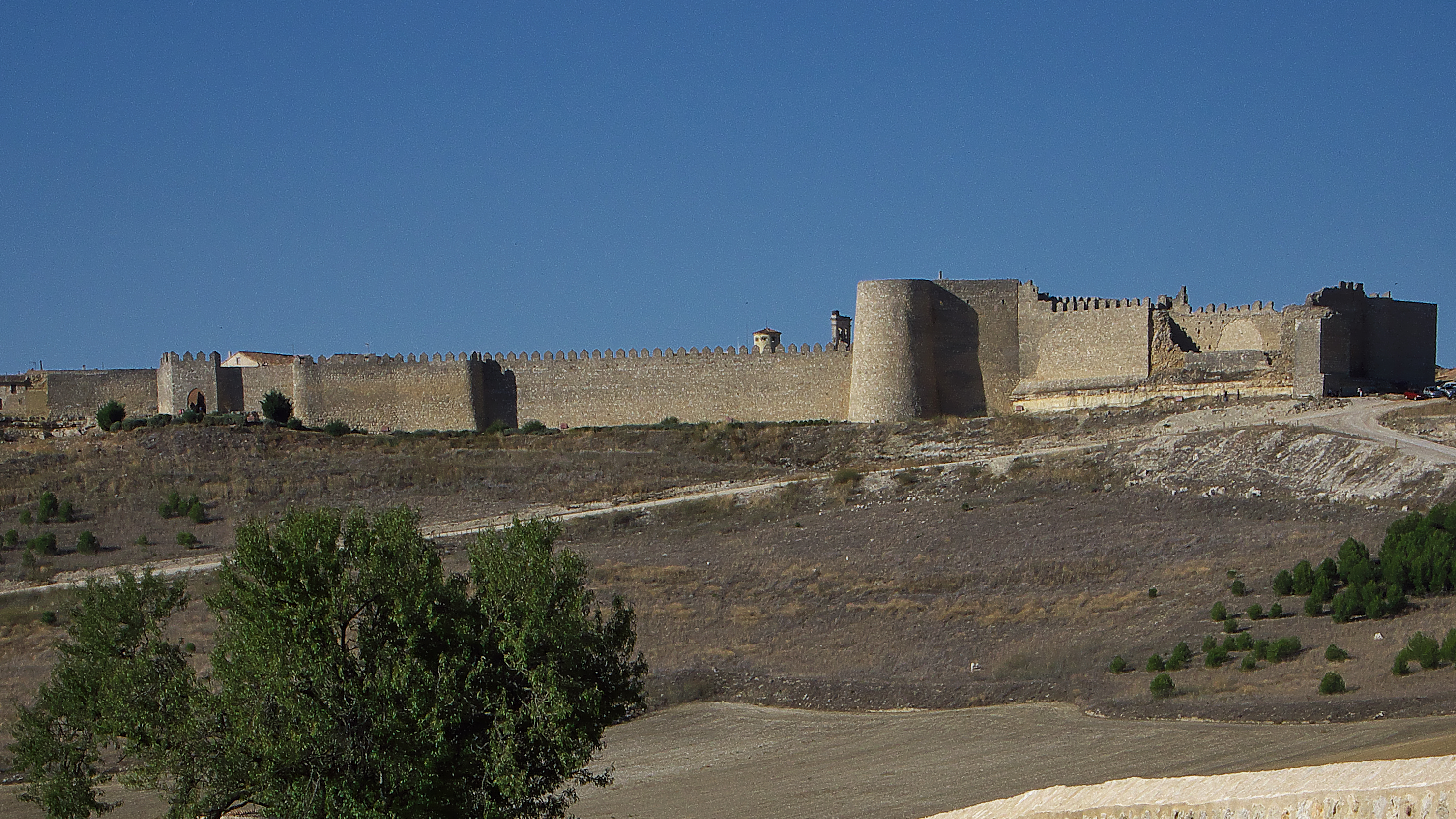 Urueña conserva restos de las murallas del siglo XIII